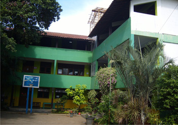 Gedung Sekolah SMP Tashfia